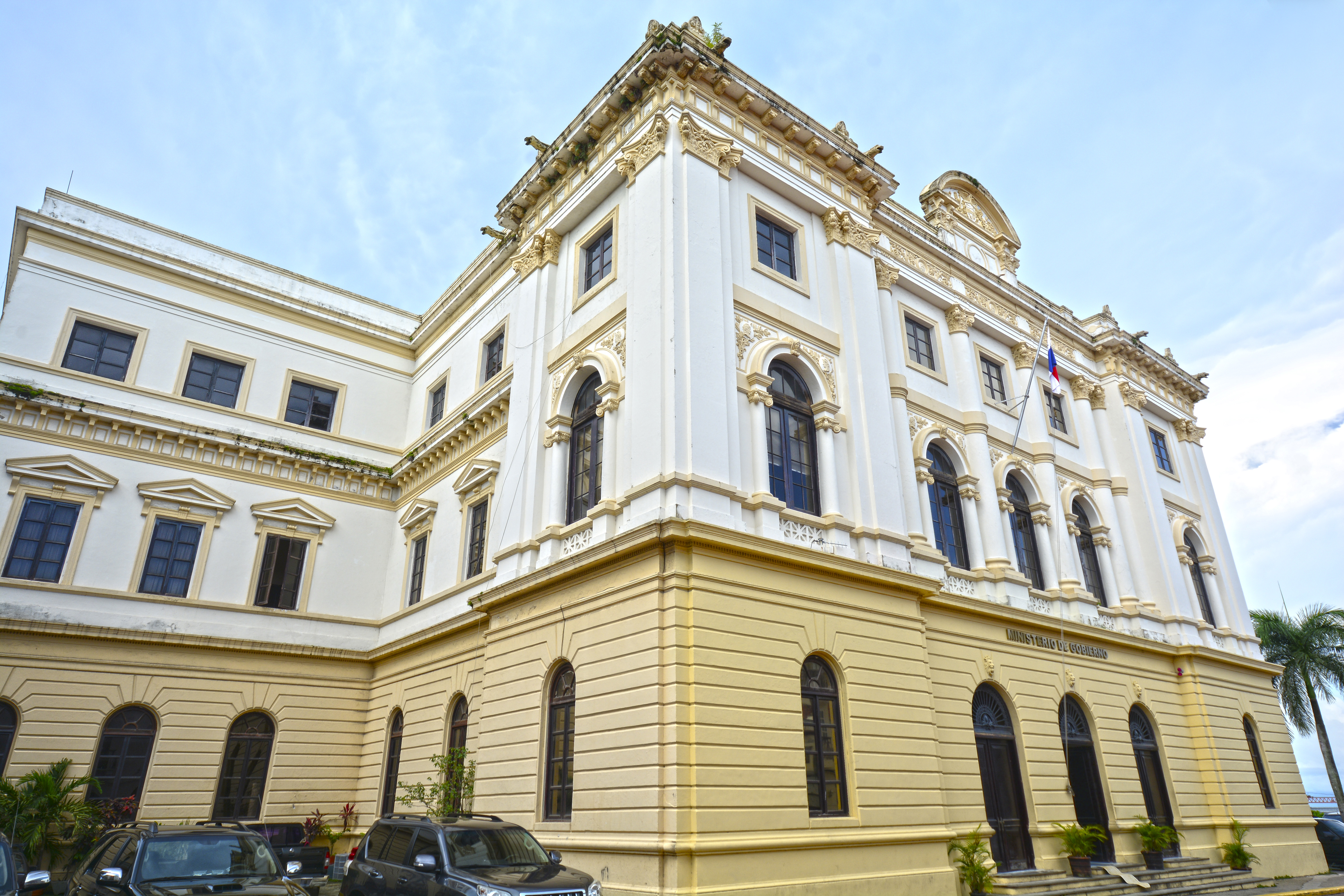 Palacio Nacional de Gobierno y Justicia en el Casco Antiguo de la Ciudad de Panamá